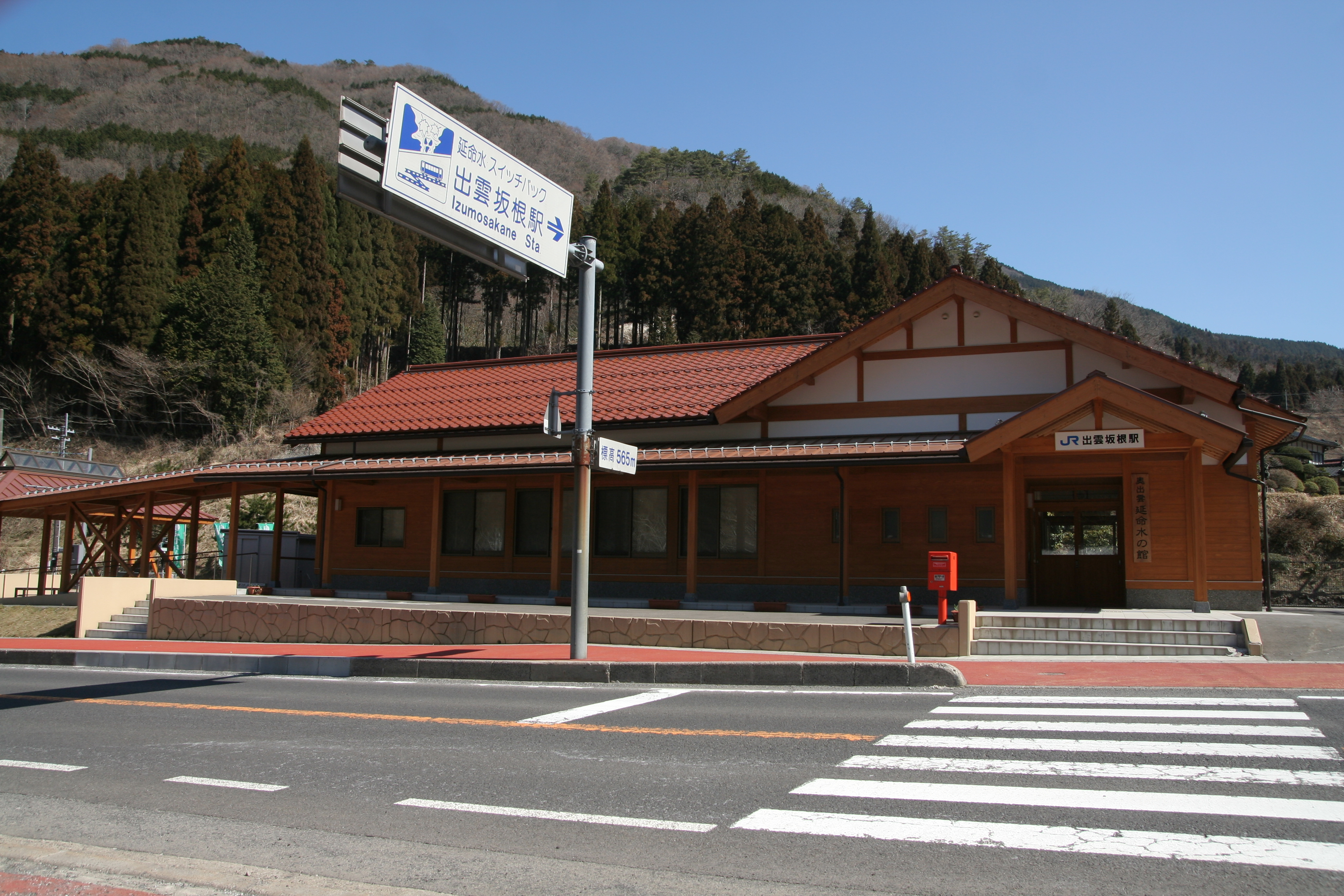 JR木次線、出雲坂根駅。真正面から。